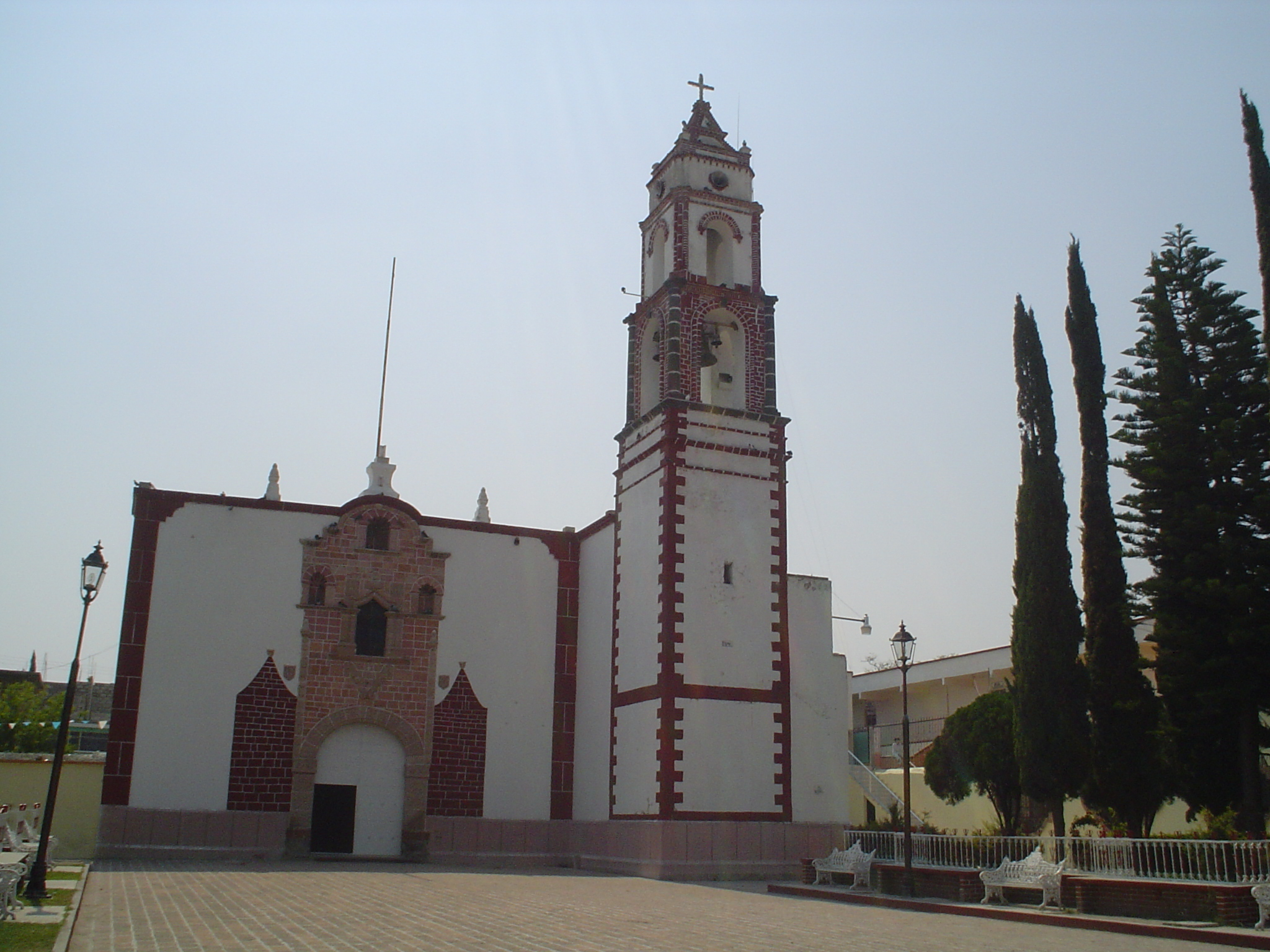 La Parroquia de San Juan Bautista de Tezontepec de Aldama, Hgo. es del siglo XVI